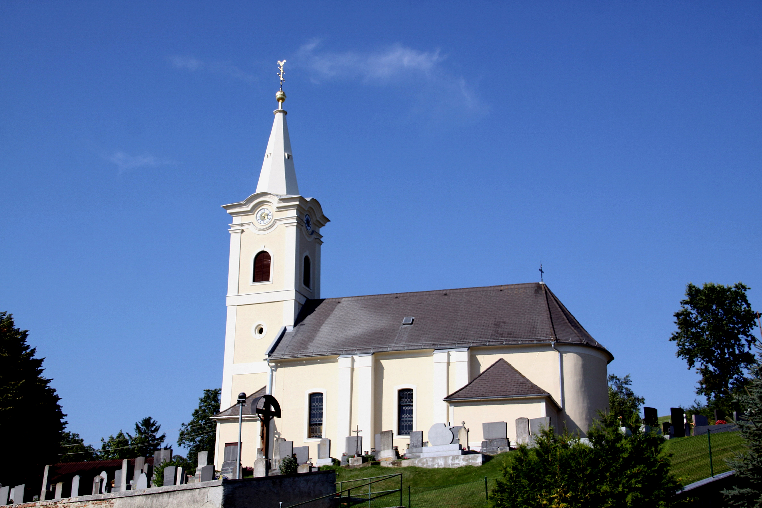 Römisch-Katholische Kirche mit Friedhof der Katastralgemeinde Karl (Gemeinde Draßmarkt, Bezirk Oberpullendorf, Burgeland, Österreich)